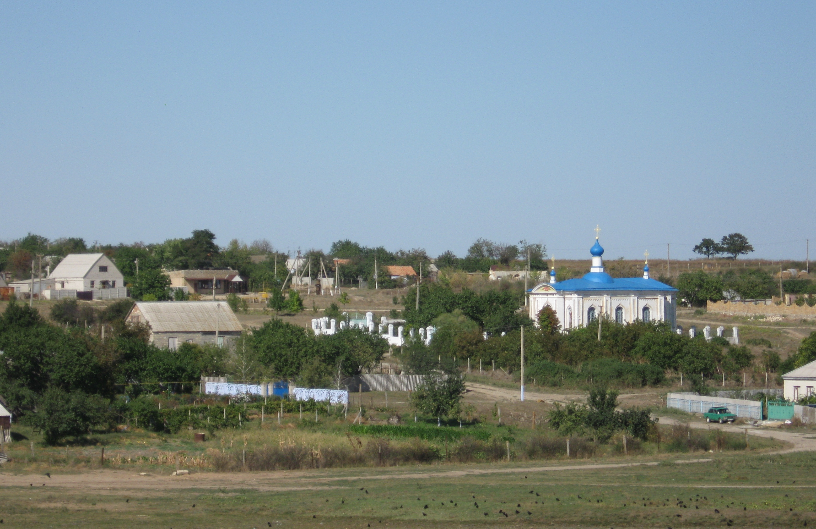 Село Стара Богданівка Миколаївського району